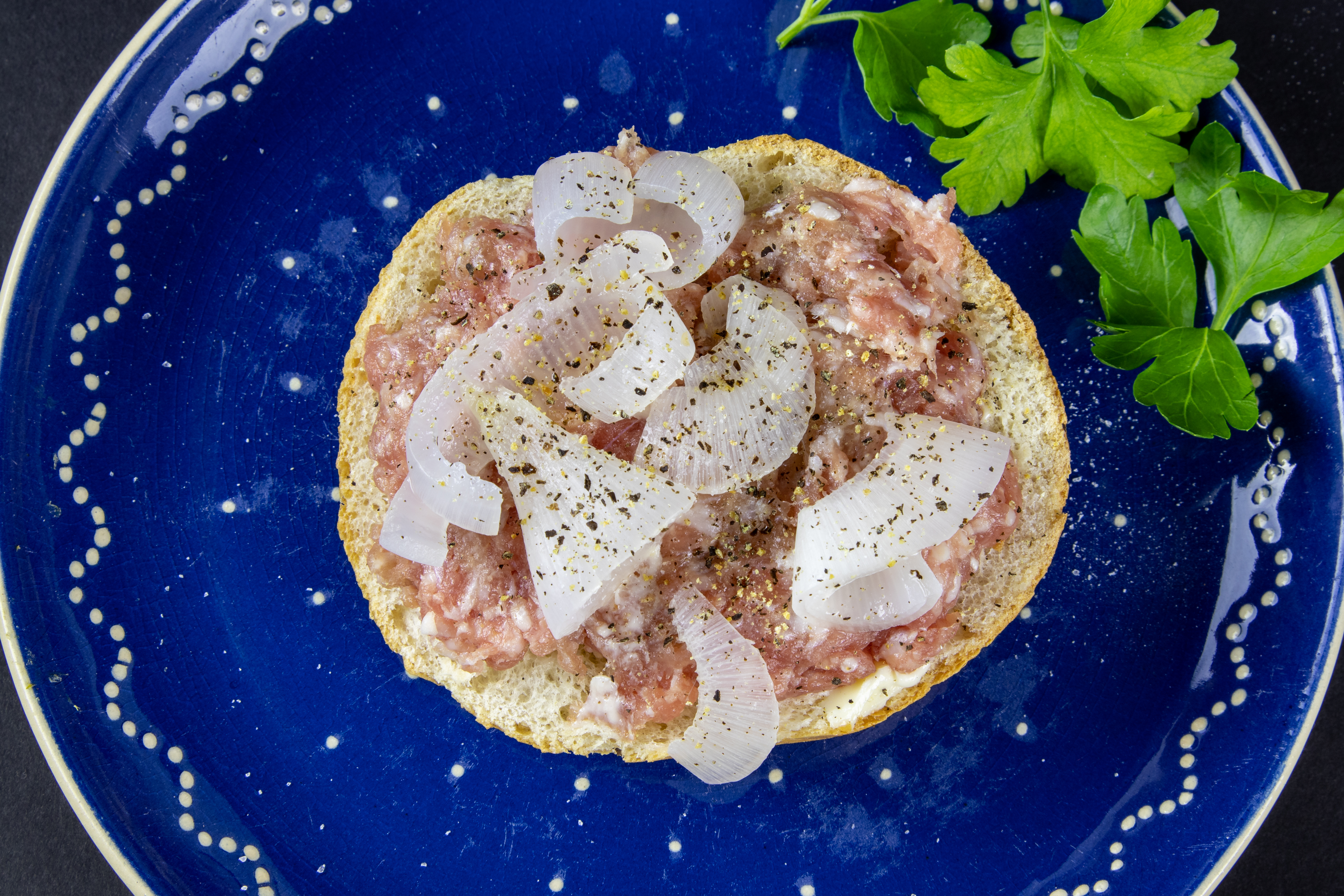 Mettbrötchen